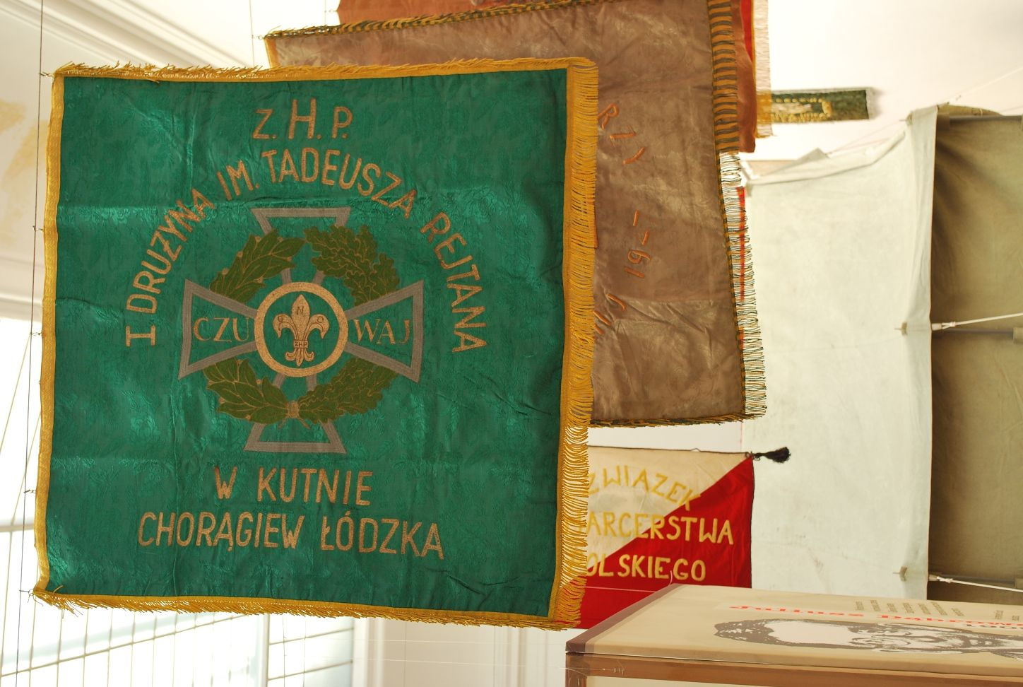 Sztandar I Kutnowskiej Drużyny Wędrowniczej im. T. Rejtana w zbiorach Muzeum Harcerstwa. 2010r.